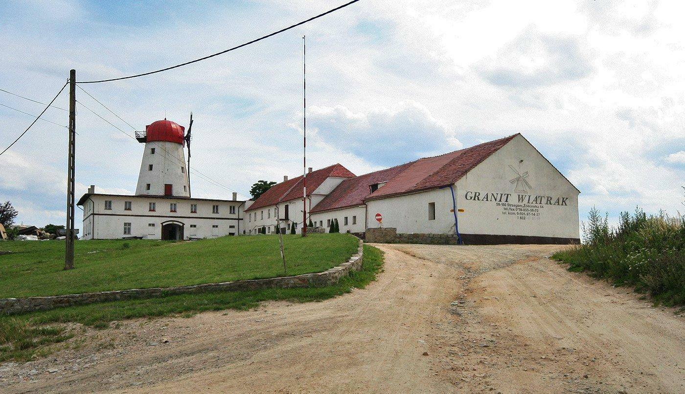 Widoczny z pobliskiego Strzegomia wiatrak typu holender stanowił element dawnego folwarku. Zachował się prawie w całości, oprócz śmigieł. Wzniesiony w I połowie XIX w, przebudowany w 1867 r., remontowany w latach 1969-72 i po 1992 r. Wiatrak wyrasta z dwukondygnacyjnego budynku gospodarczego. Obiekt wraz z towarzyszącymi budynkami jest dziś w prywatnych rękach. Dodaję jeszcze jedno zdjęcie do serii starych, bo widać tu dachy zabudowań gospodarczych.